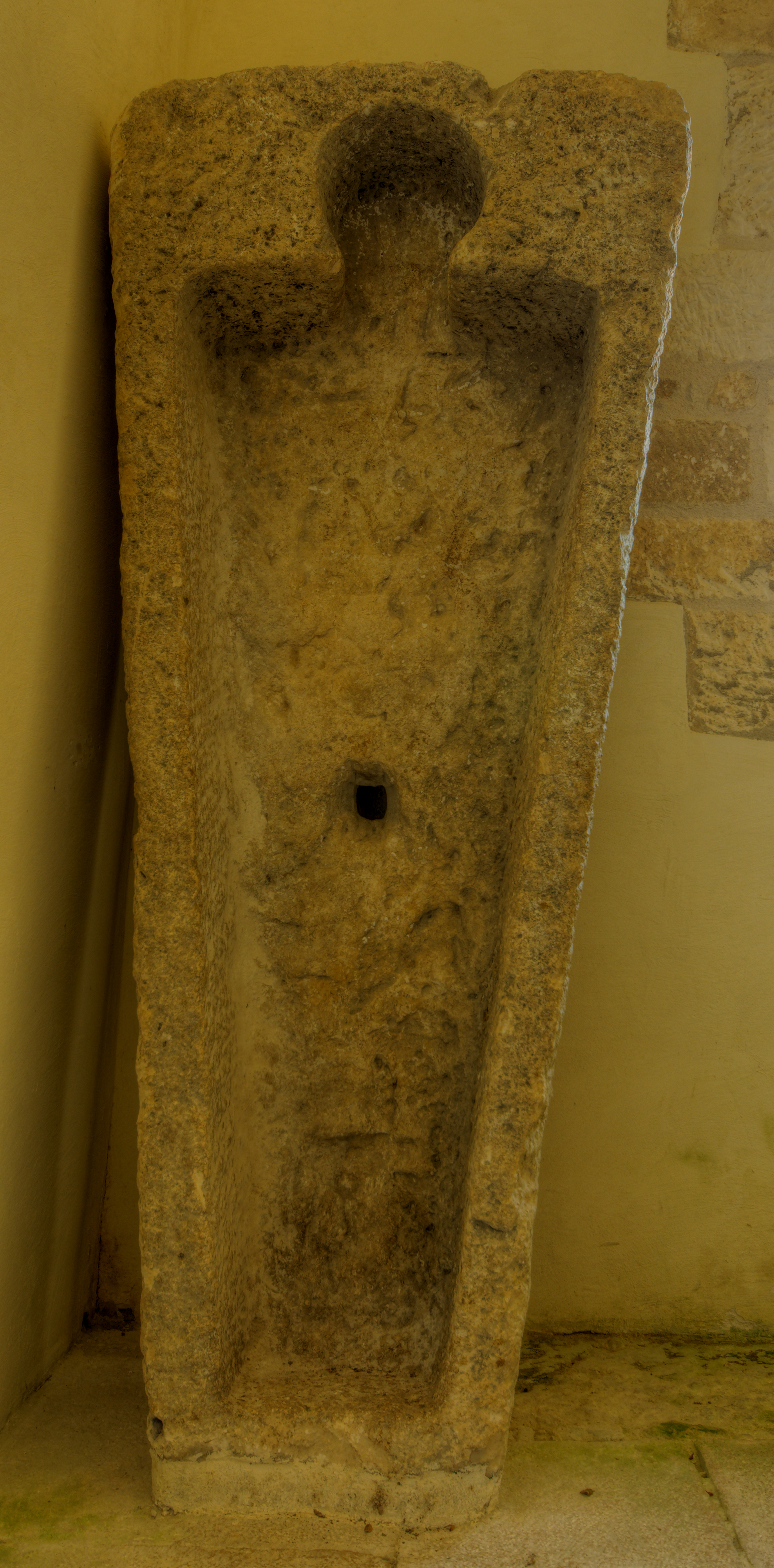 Église de Saint-Dizier-l'Évêque : sarcophage anthropomorphe datant probablement du XIe siècle (monument inscrit MH n° PA00101157) (HDR).